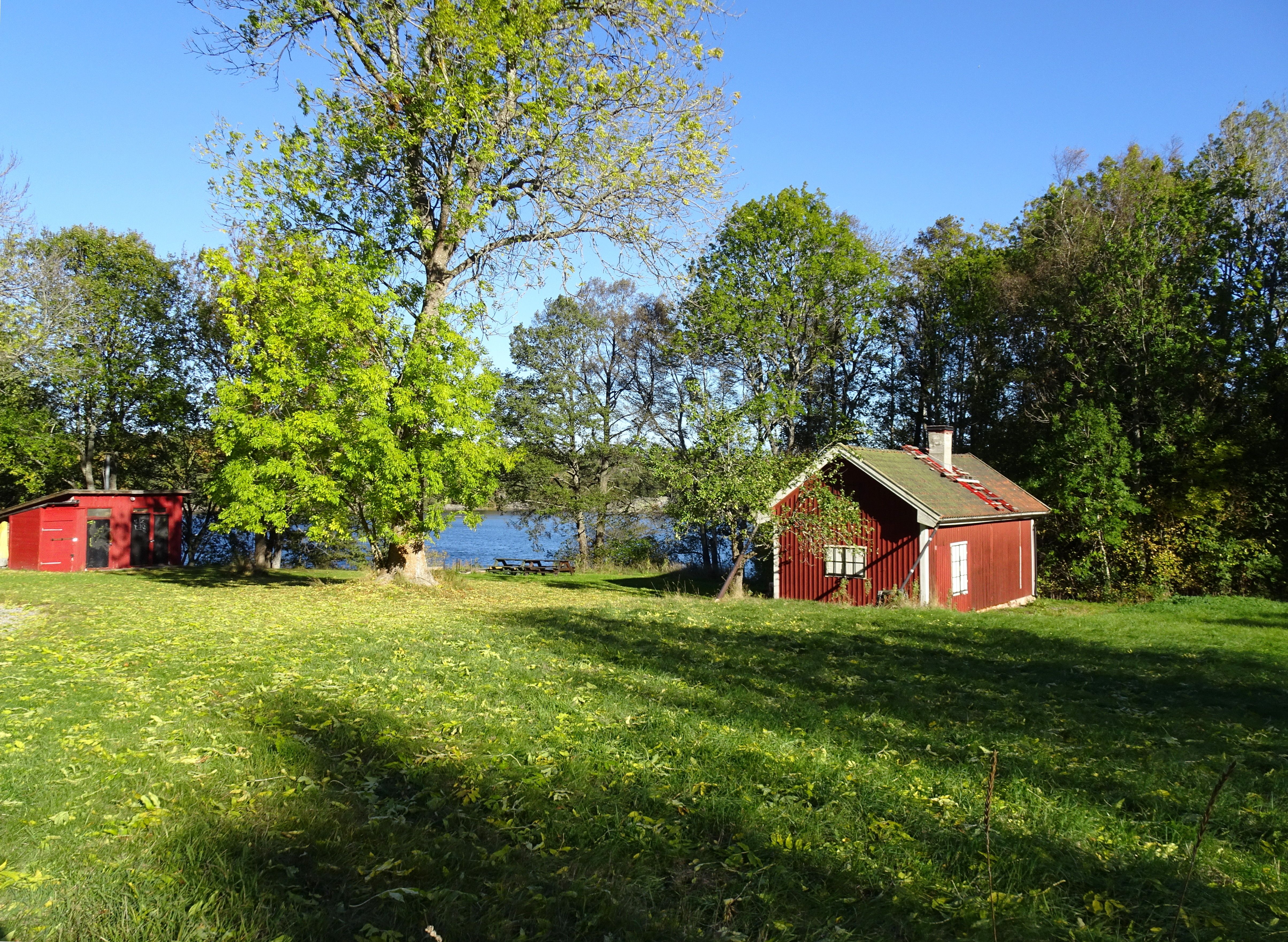 Djupåtorpet